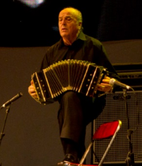 Raúl Garello en el Día del Tango. 2012.